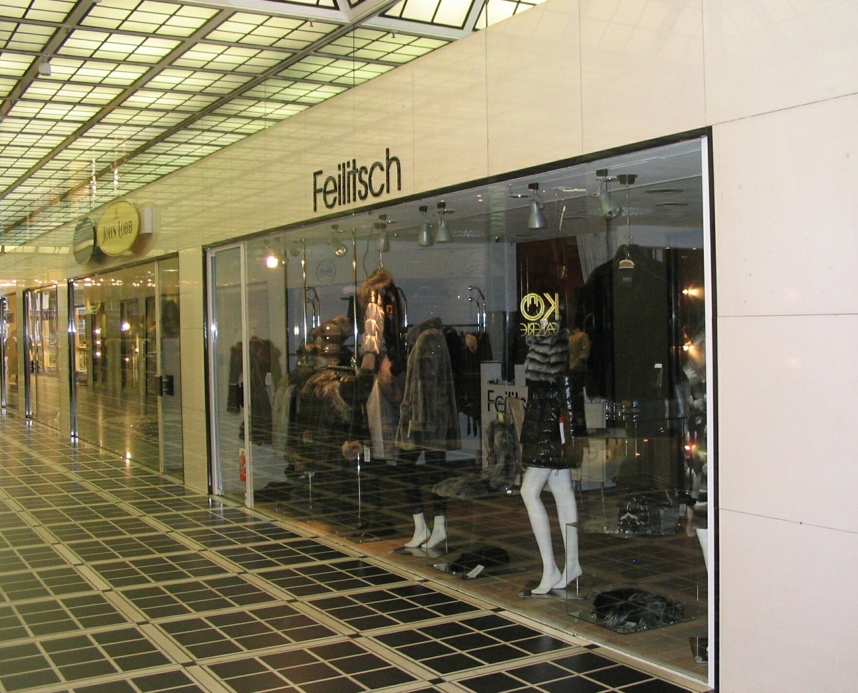 Feilitsch GmbH, Pelzgeschäft in Düsseldorf, Königsallee 58 (Kö-Galerie)